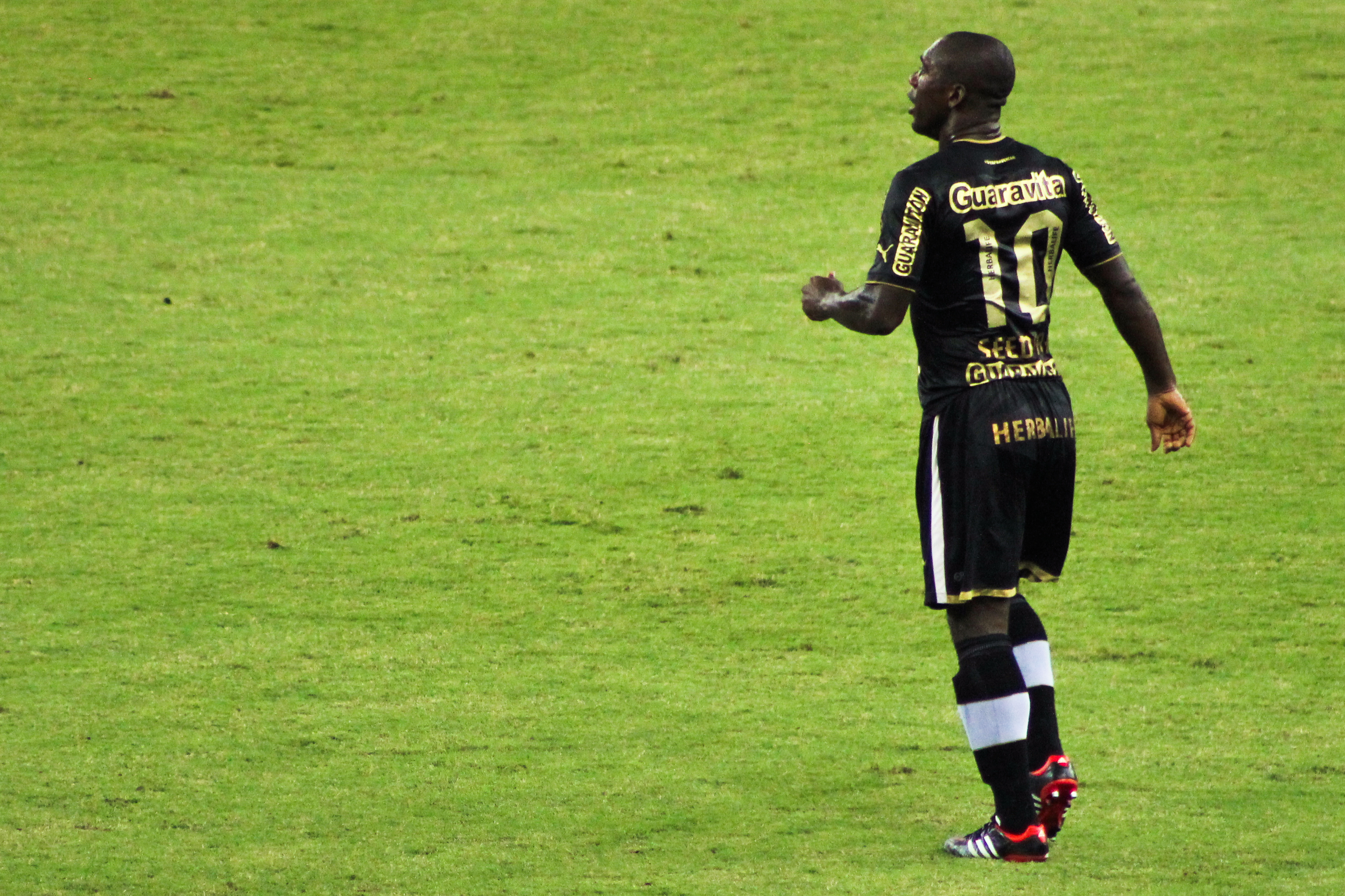 Seedorf